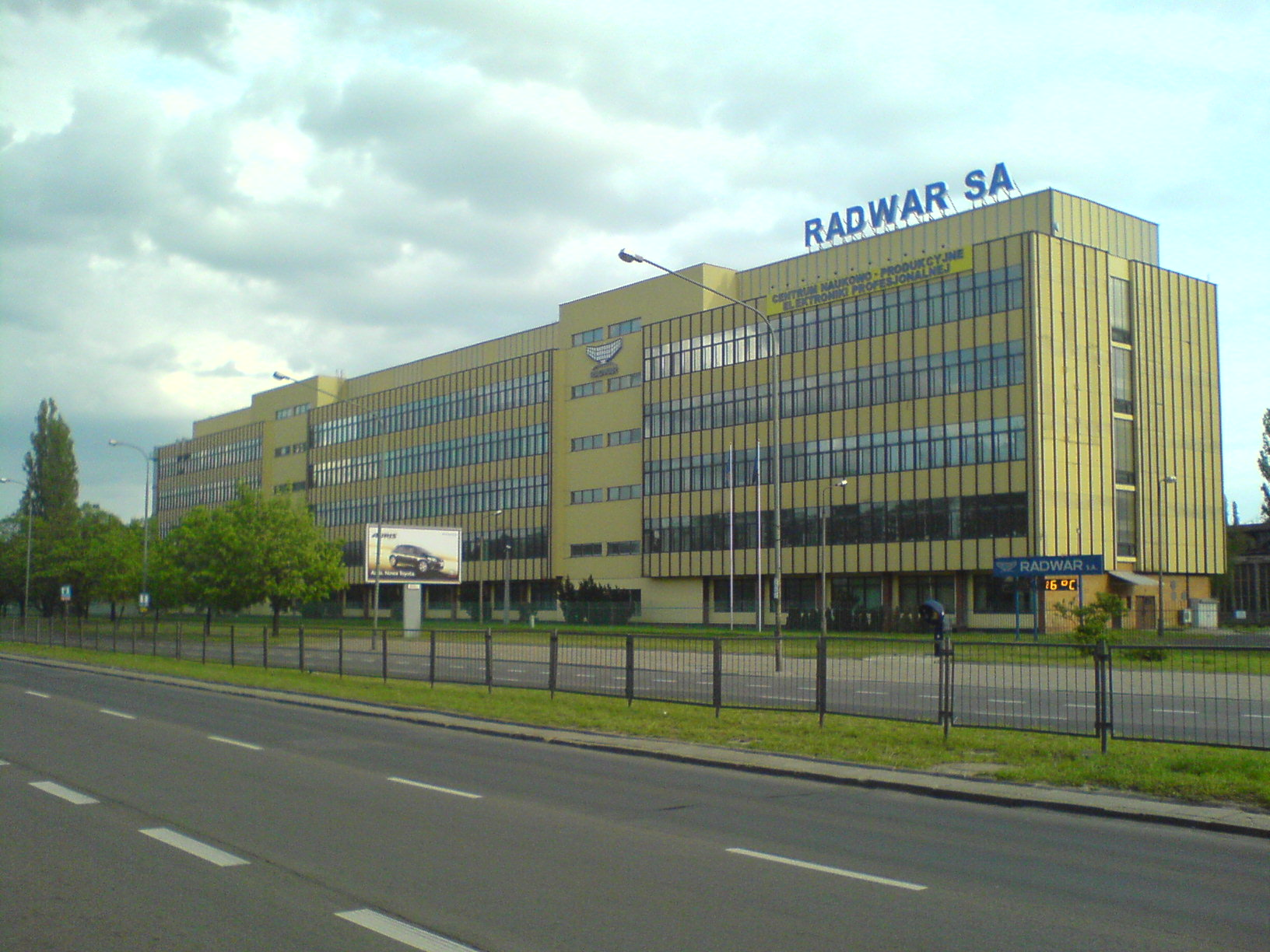 PL, Warsaw, Poland, Grochów, Radwar